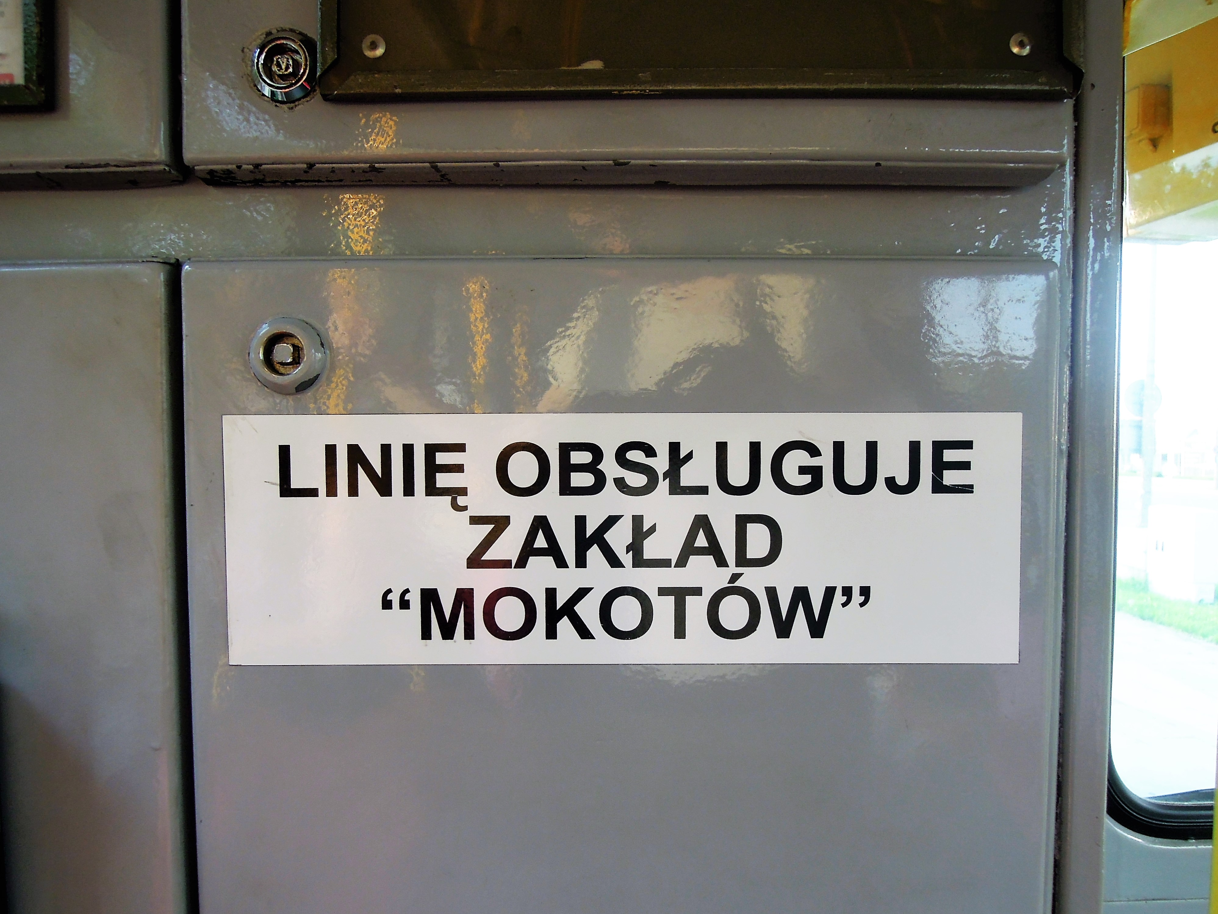 Hinweisschild der Zugehörigkeit zum Betriebshof Mokotów an einem Konstal 105Na